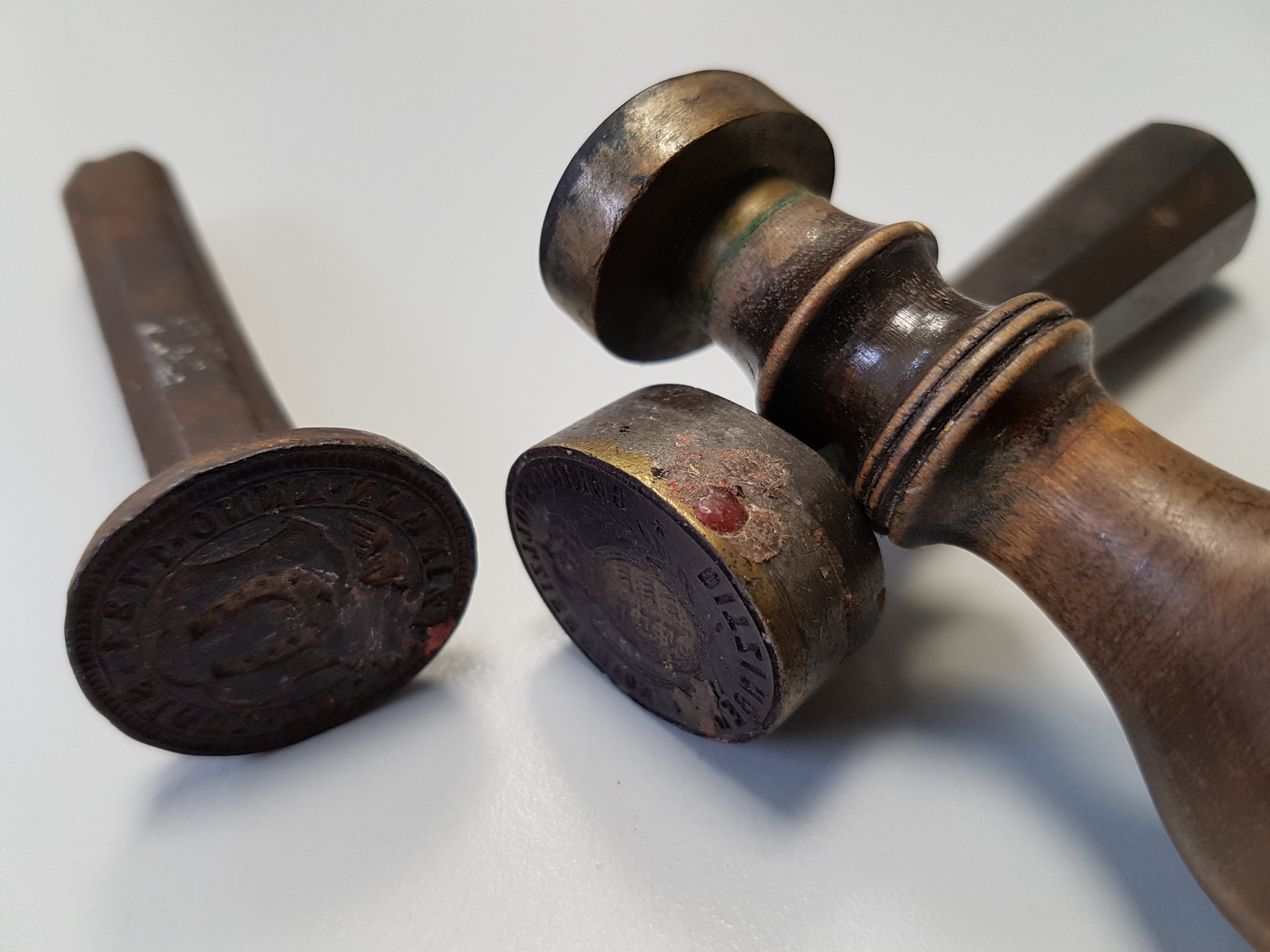 Verschiedene Siegelstempel aus der Stempelsammlung des Stadtarchivs Ditzingen